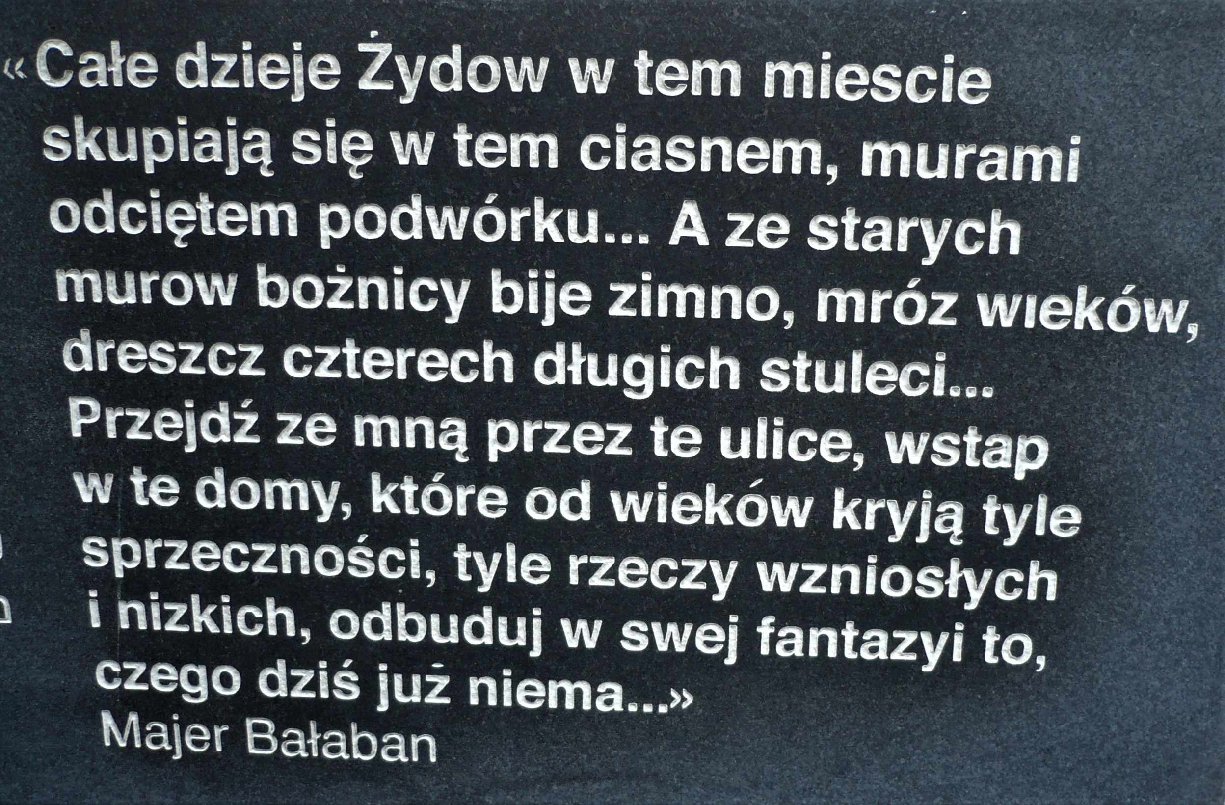 Synagoga Złota Róża we Lwowie. Pomnik